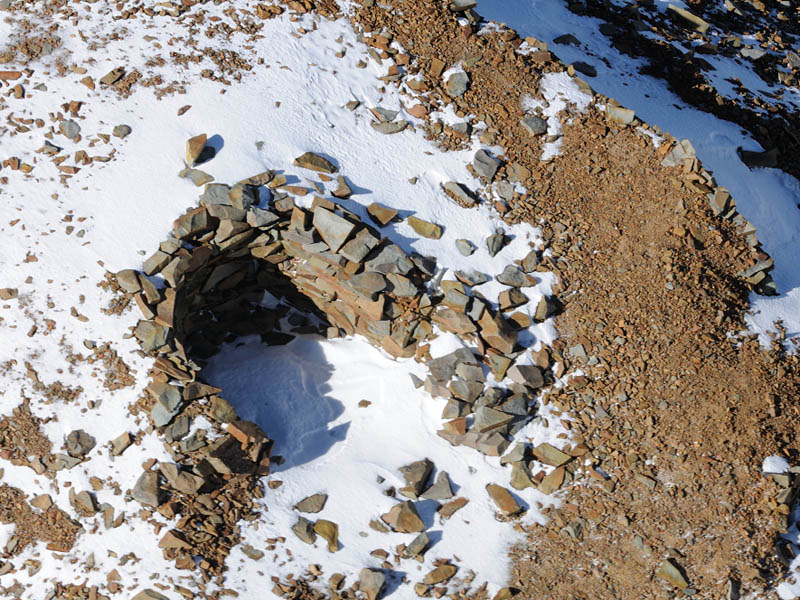 Adoratorio inca en el Cerro El Plomo. (Fotografía: Cristian Becker, Museo Nacional de Historia Natural).